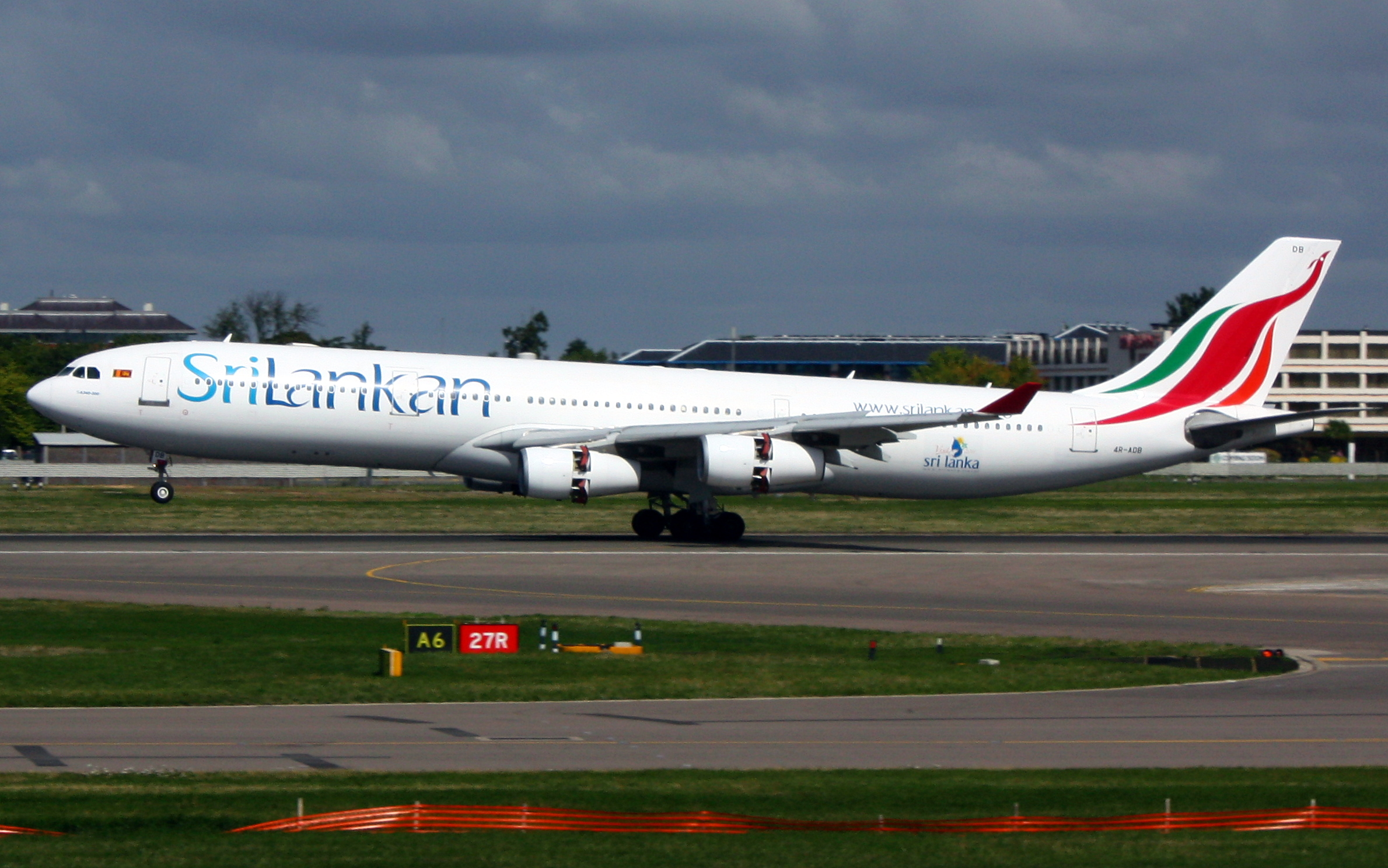 Sri Lankan Airlines A340-300 4R-ADB.